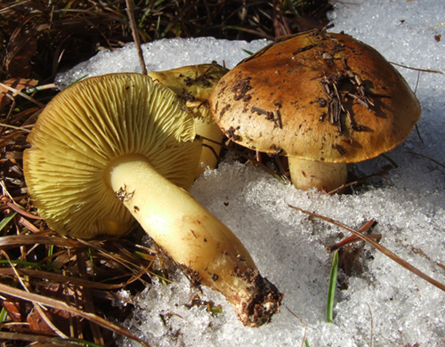 Tricholoma flavovirens.